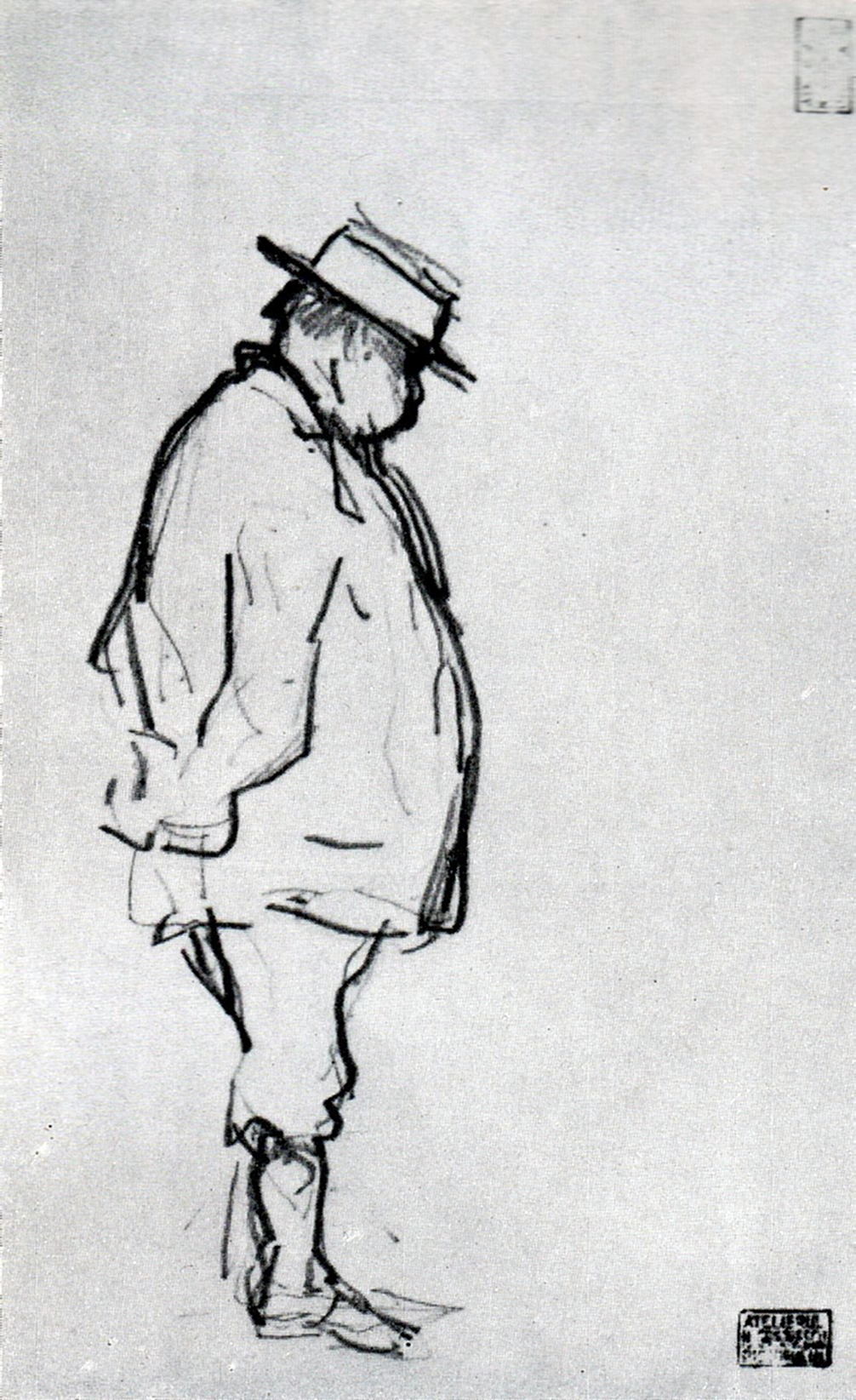 Desen de Nicolae Grigorescu care l-a schițat pe fratele său Gheorghe Grigorescu la bătrânețe ... gras și posac, așa cum l-a caracterizat istoricul George Oprescu.